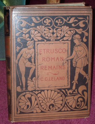 libro di fine Ottocento originale da collezione privata